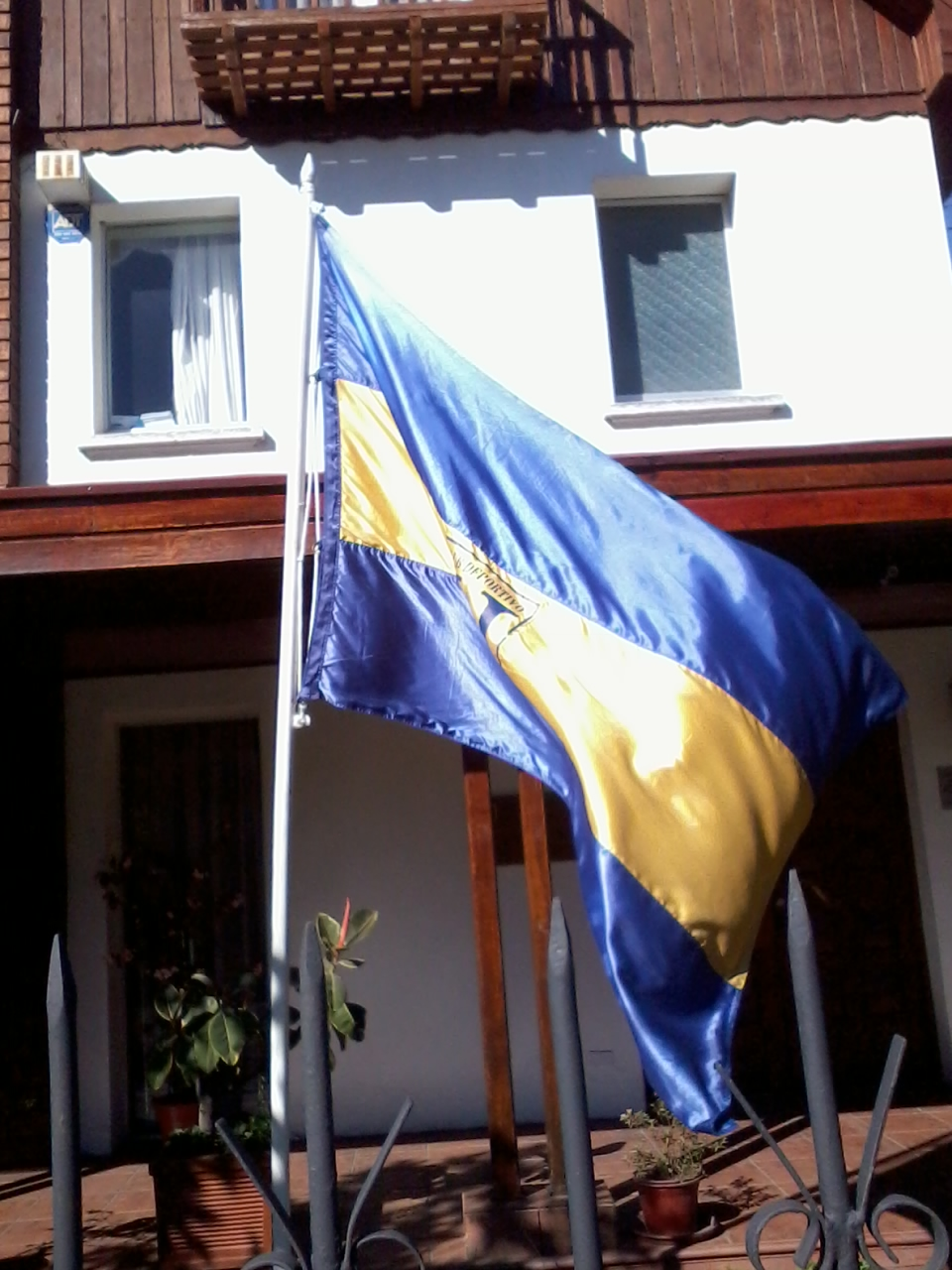 Bandera institucional del club deportivo Universidad de Concepcion ubicada en la sede del club, Beltran Mathieu 97